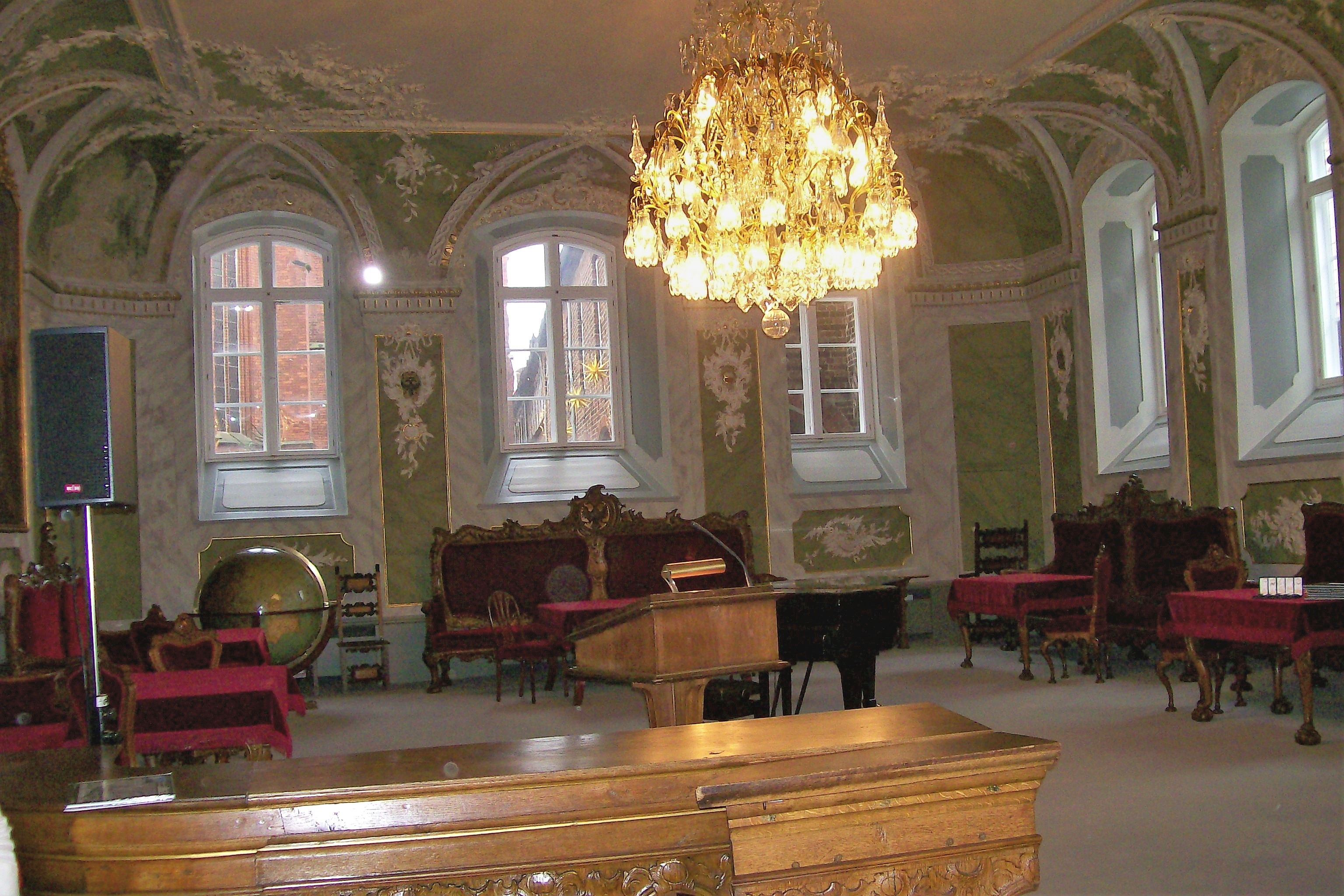 Audienzsaal des Lübecker Rathauses im Stil des Barock